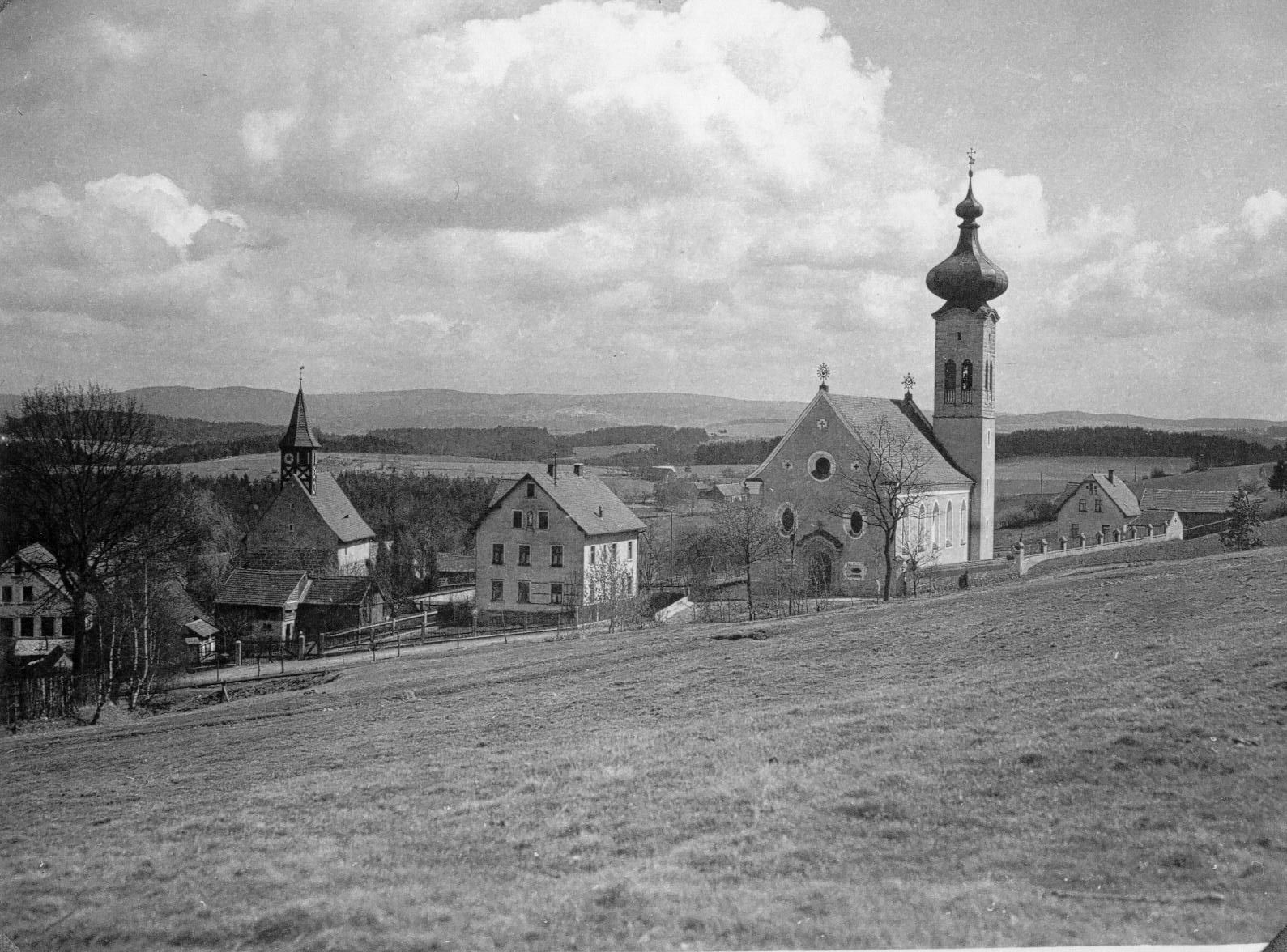 Wilchenreuth im Sommer 1929, links die alte (inzwischen evangelische) Kirche St. Ulrich, rechts die neue kath. Pfarrkirche St. Ulrich